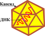 Строение вирусной частицы